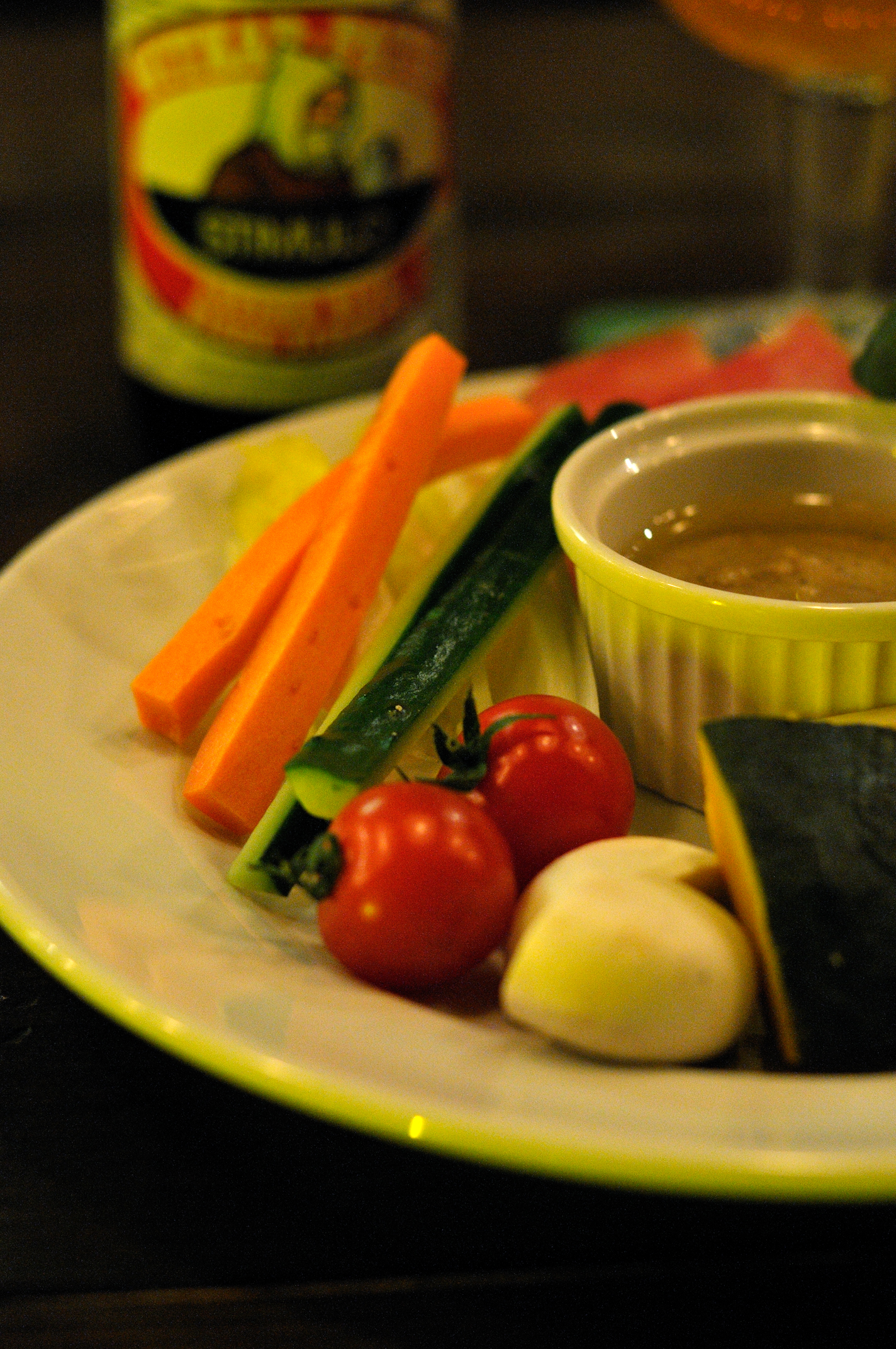 bagna càuda con verdure